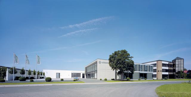 Der Firmensitz der Wilhelm Altendorf GmbH: Minden in Nordrhein-Westfalen